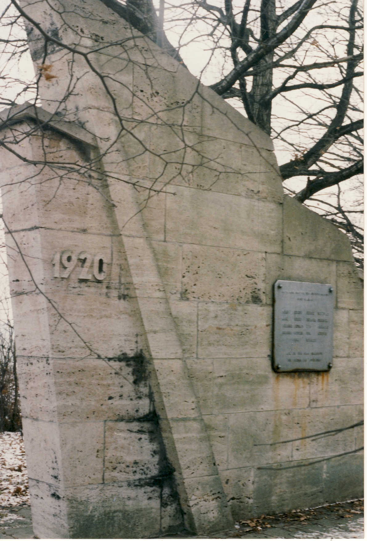 Tunzenhausen Denkmal für die Opfer des Kapp-Putschs